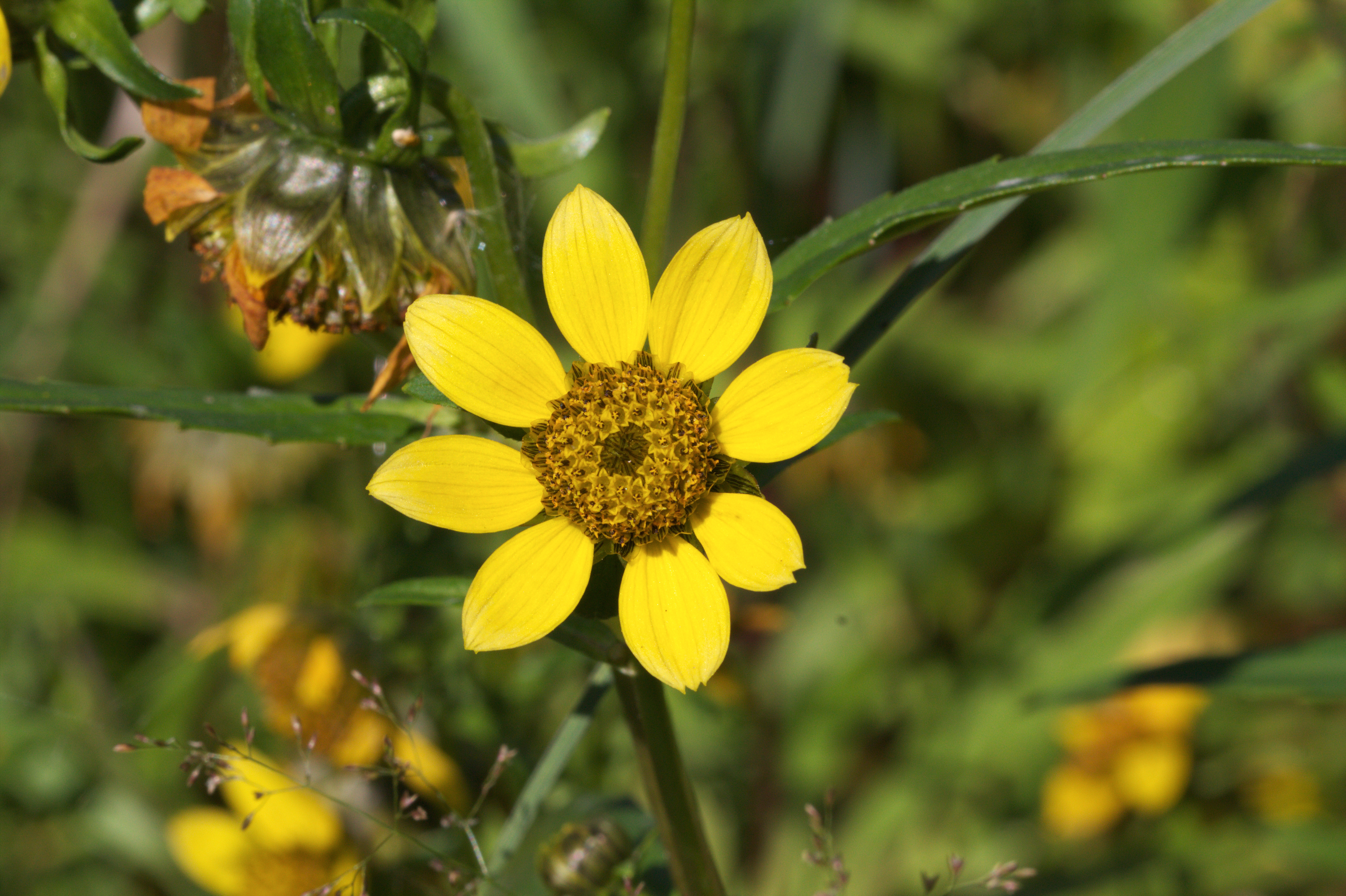 Rybníky u Lovětína (přírodní památka) - pozdní léto - Bidens cernula L., dvouzubec nicí - status ohrožení v ČR: není